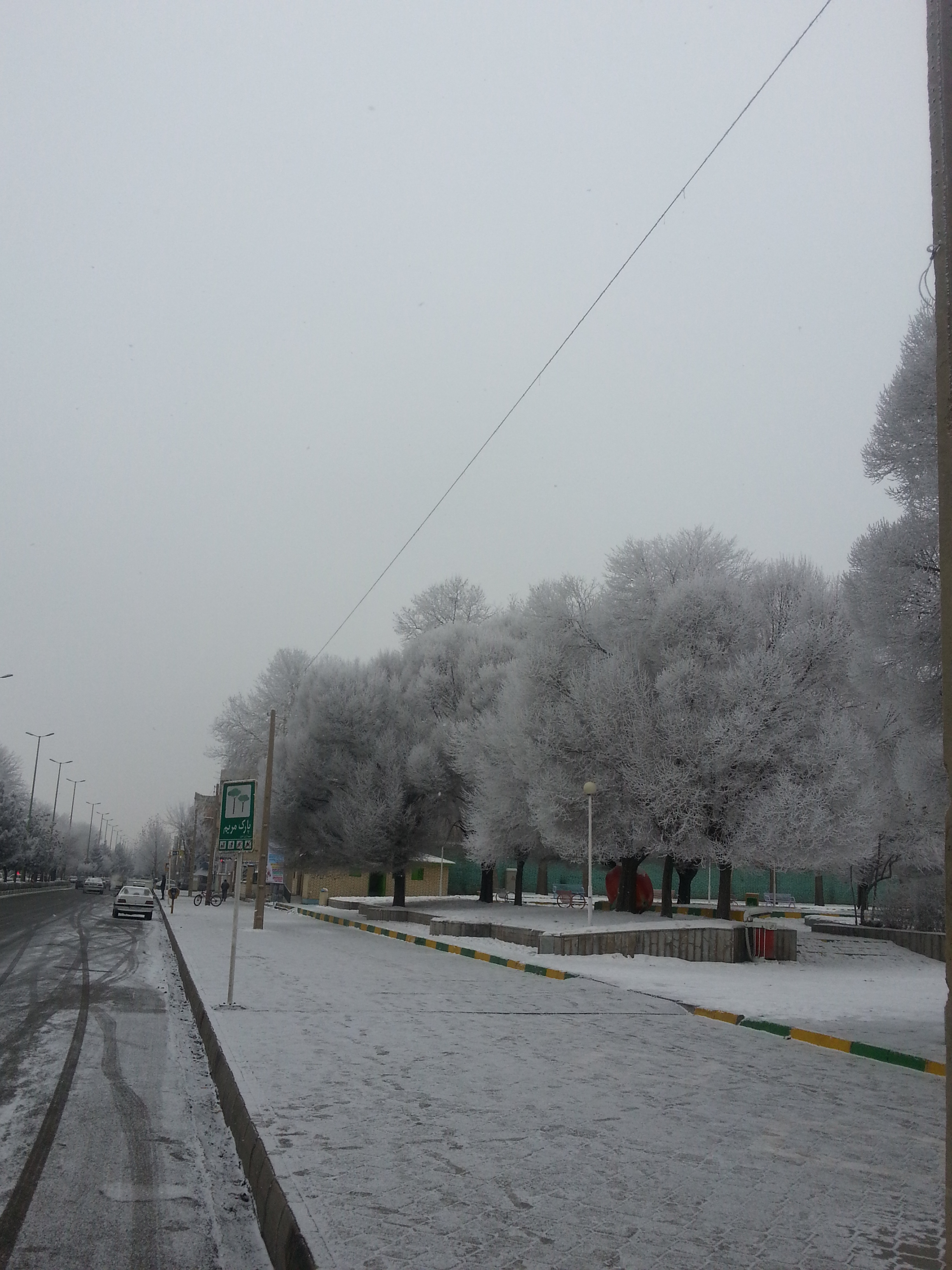 پارک مریم خوی